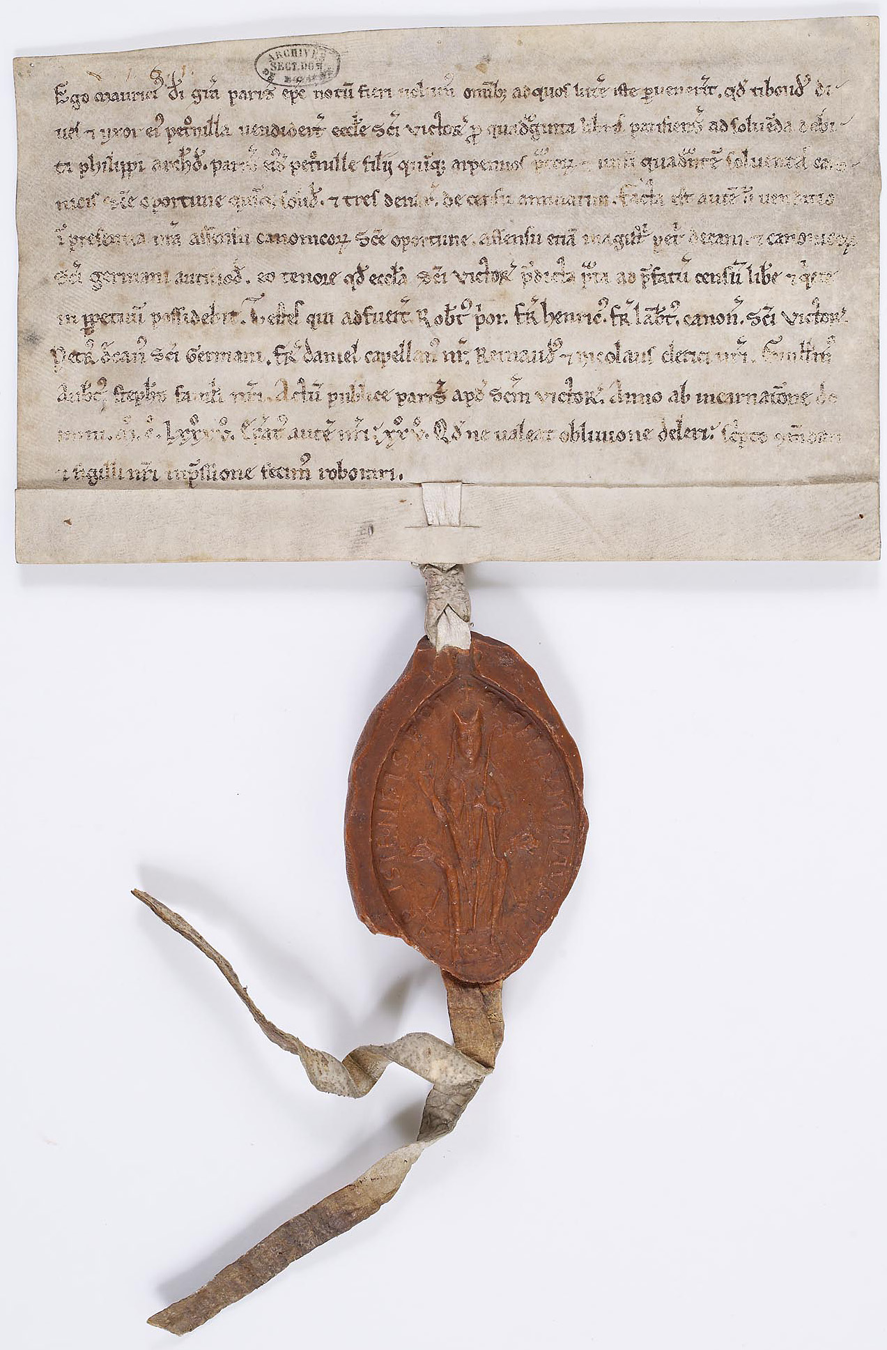 Maurice de Sully, évêque de Paris confirme une vente de prés situé près de Paris, 1185